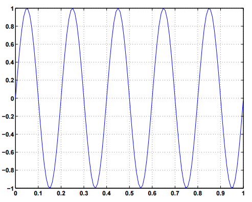 Plot gráfico seno